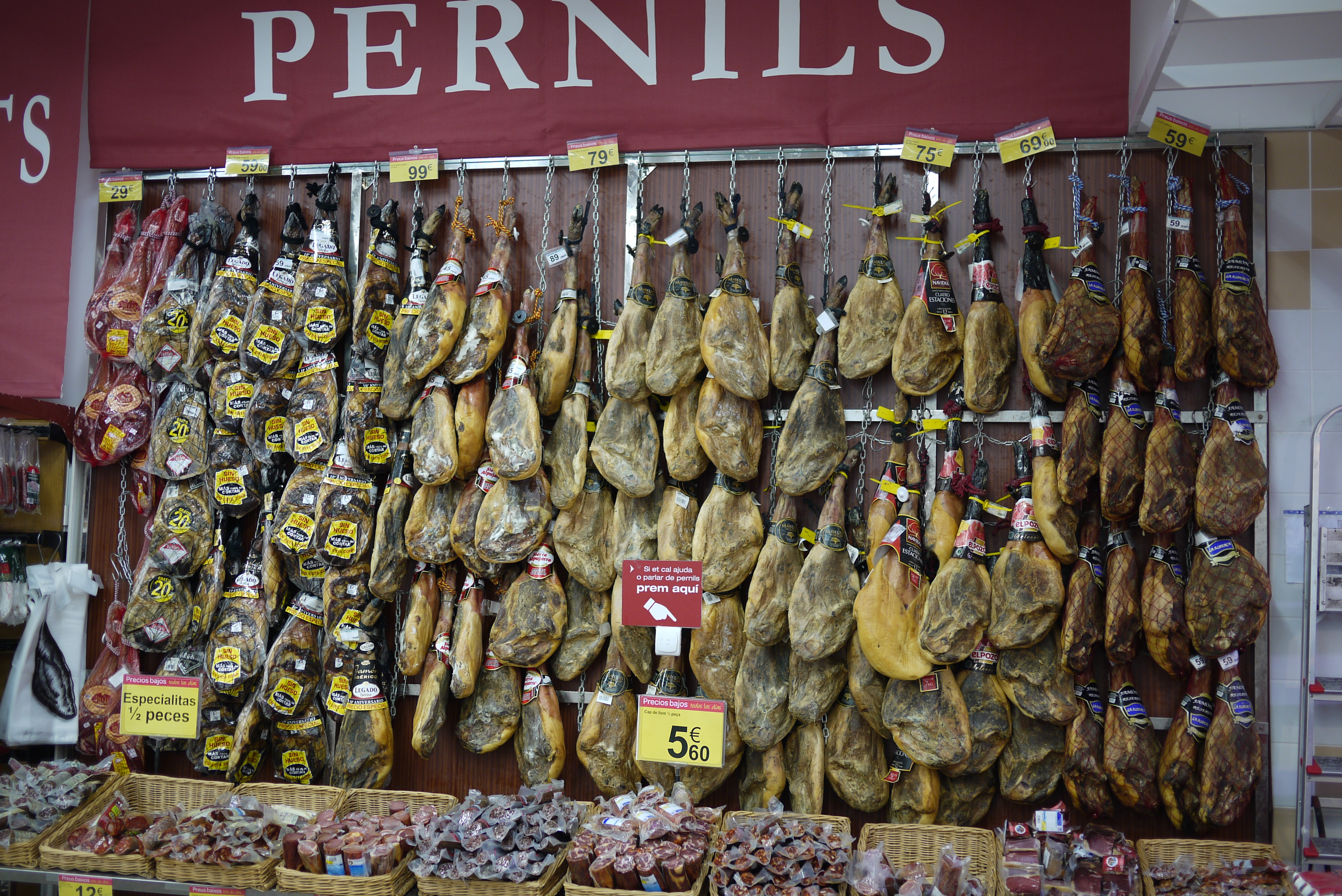 Un mur de jambons ibériques de différents fabricants au supermarché Carrefour de l' Escala. En catalan, jambon se dit "pernil". L' Escala, Catalogne, Espagne.